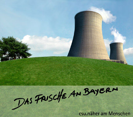 Bildbeschreibung: Plakat: Das frische an Bayern Quelle: Guerilla art Autor: Crash, Guerilla art Datum: 01.05.2006